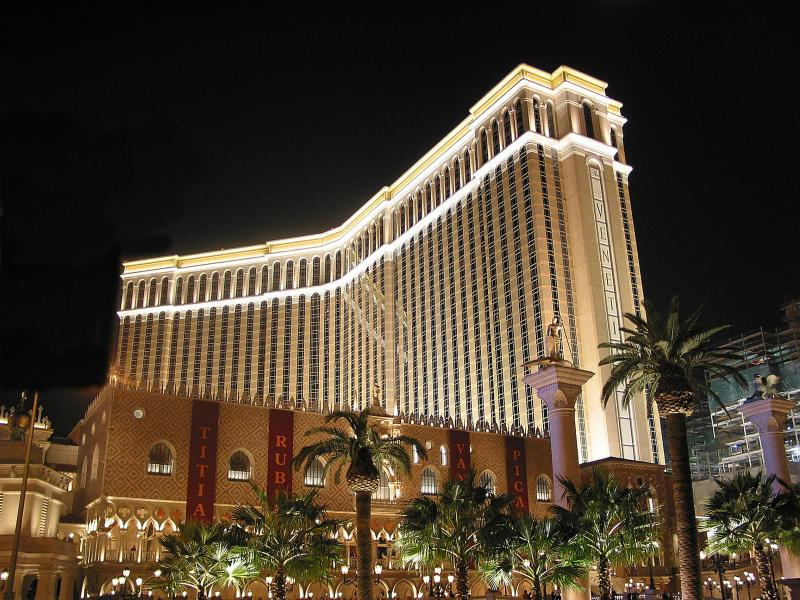 Venetian